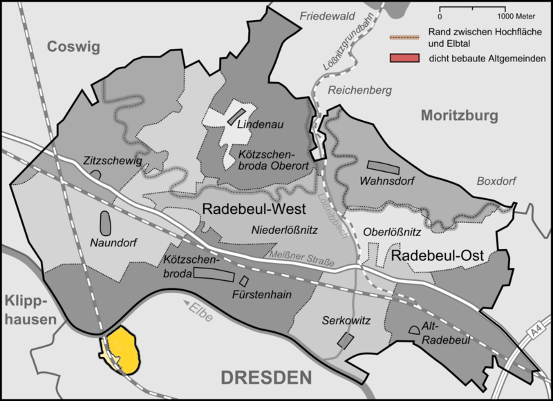 Karte der Stadt Radebeul, ehemals linkselbischer Stadtteil Am Fährhaus